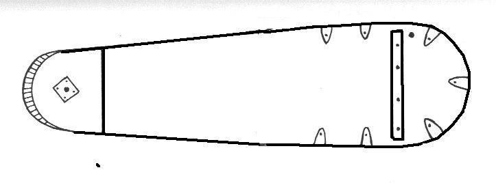 eigen tek.